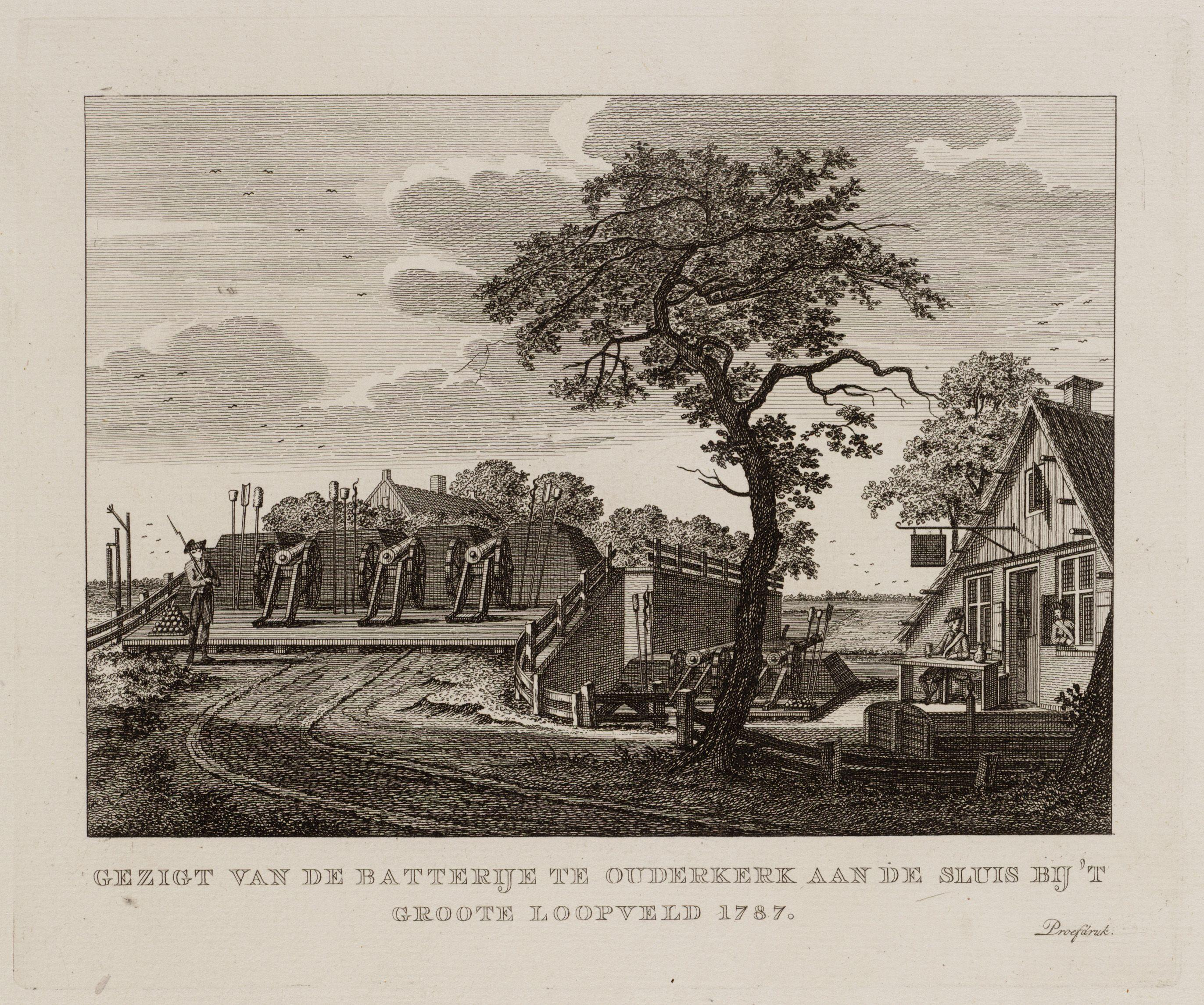 Afbeeldingen der batterijen om Amsterdam. Gezigt van de batterije te Ouderkerk aan de sluis bij t Groote Loopveld 1787 Afbeeldingen van de tijdelijke verdedigingswerken om Amsterdam, aangelegd vanwege het beleg door Pruissische troepen in september 1787. Serie van veertien anonieme etsen. De batterij in Ouderkerk aan de Amstel. Afmetingen 140 x 195 mm Documenttype prent